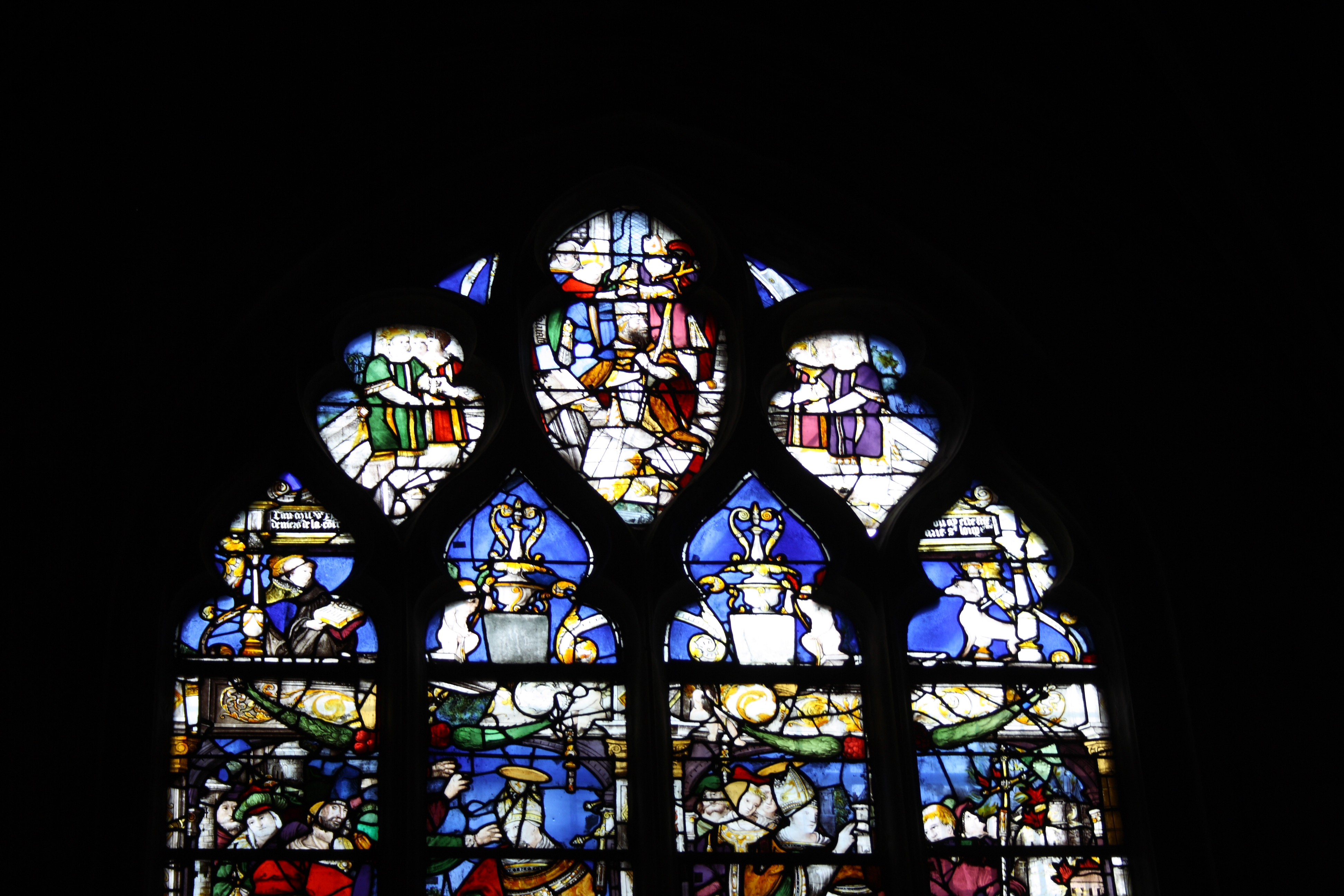 Katholische Pfarrkirche Saint-Aspais in Melun im Département Seine-et-Marne in der Region Île-de-France (Frankreich), Bleiglasfenster aus dem 16. Jahrhundert, Darstellung: Szenen aus dem Leben des hl. Lupus von Sens (Saint-Loup)